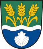 Želnava